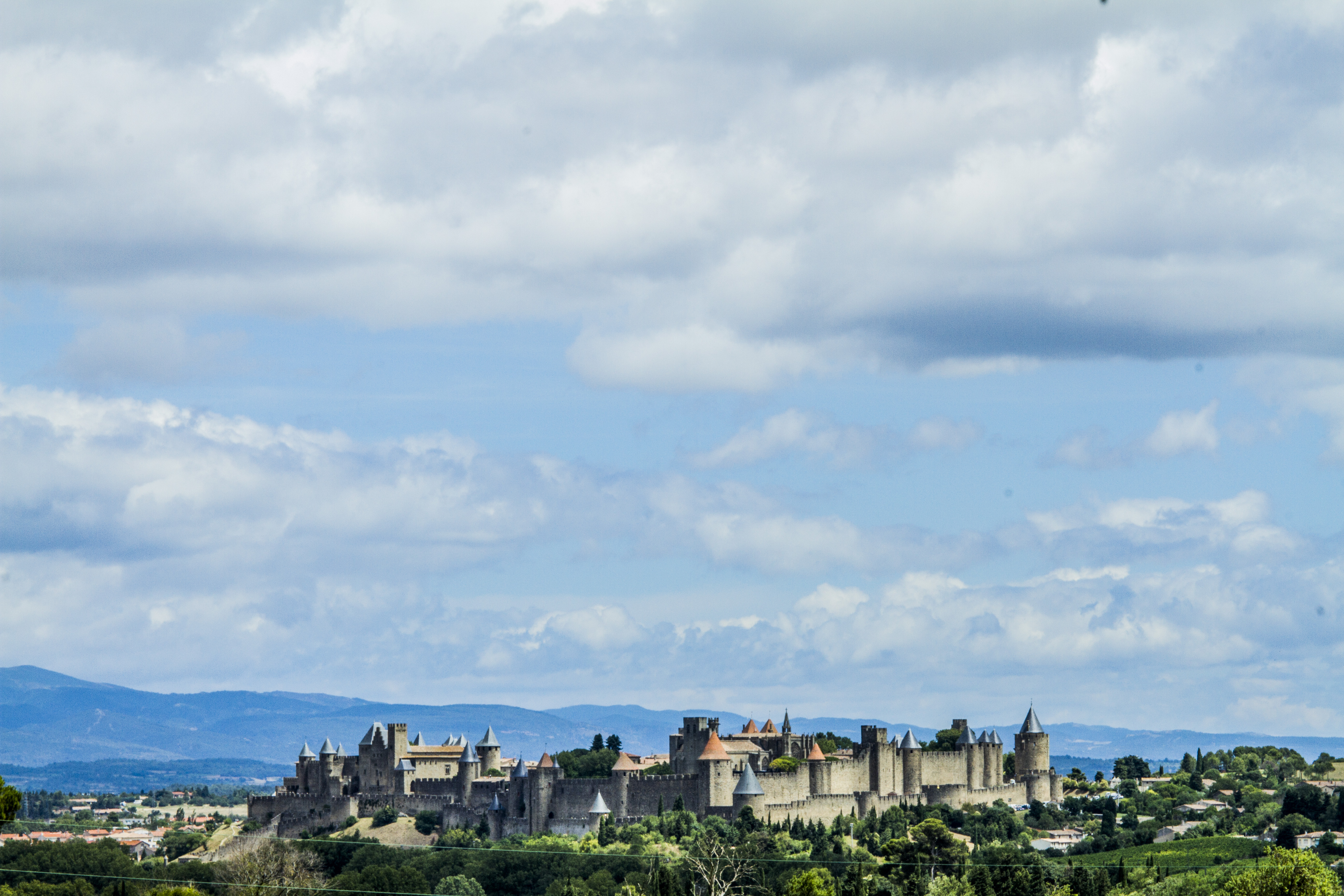 Cité Médiévale